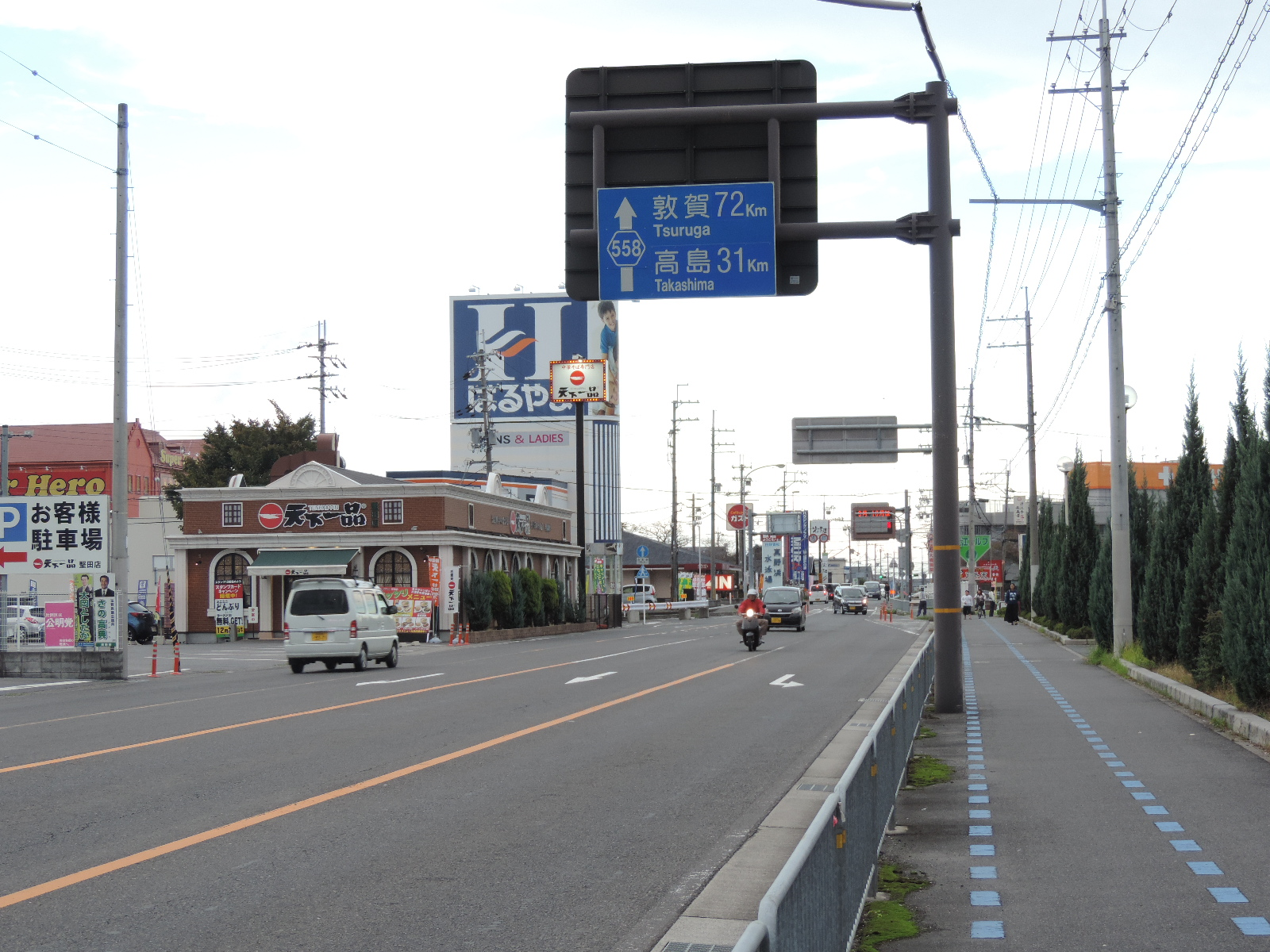 滋賀県道558号高島大津線。琵琶湖大橋交差点から北を臨む。